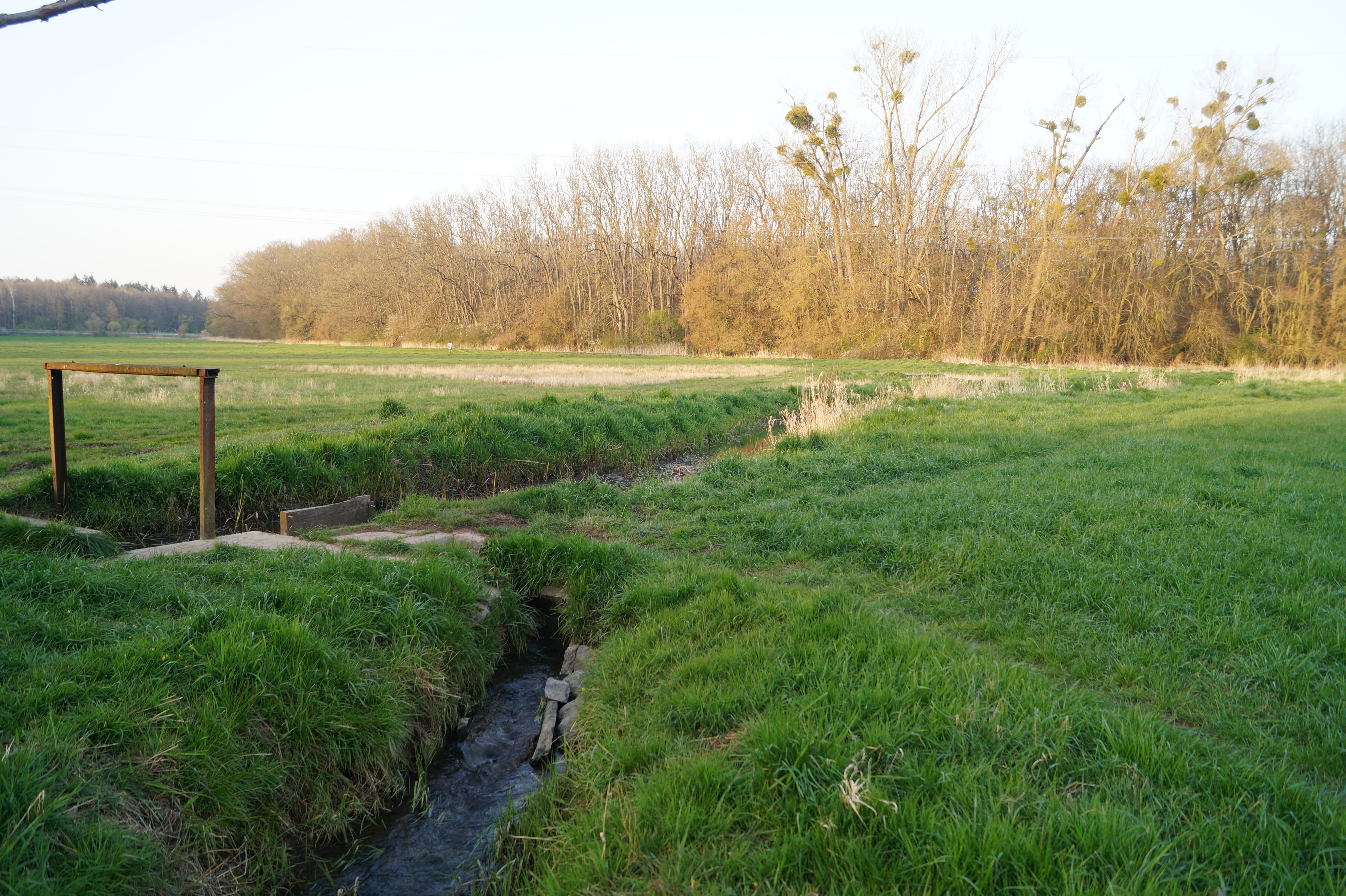 Braubach, Ableitung von Braubach (oben, nach links) und Salisbach (unten, nach unten links) östlich der ehemaligen Fasanerie in Hanau-Wilhelmsbad. Die Bifurkation des Salisbaches vom Krebsbach befindet sich etwa 60-80 m entfernt am Waldrand, etwa in der Bildmitte.